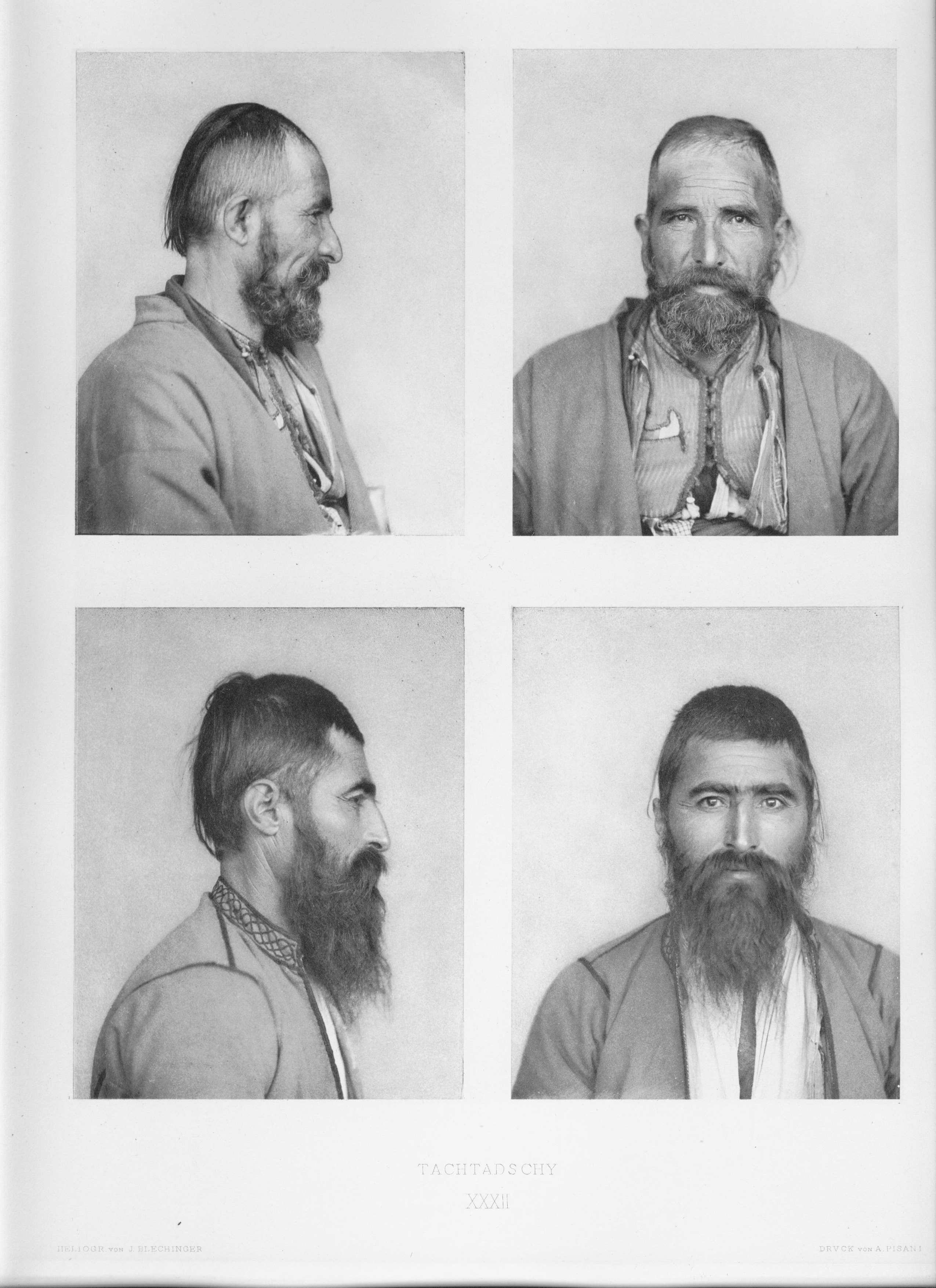 Illustration physischer Merkmale männlicher Tachtadschy (Tahtacı)